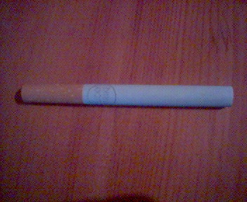 En cigarett av märket Lucky Strike. Foto: CNB